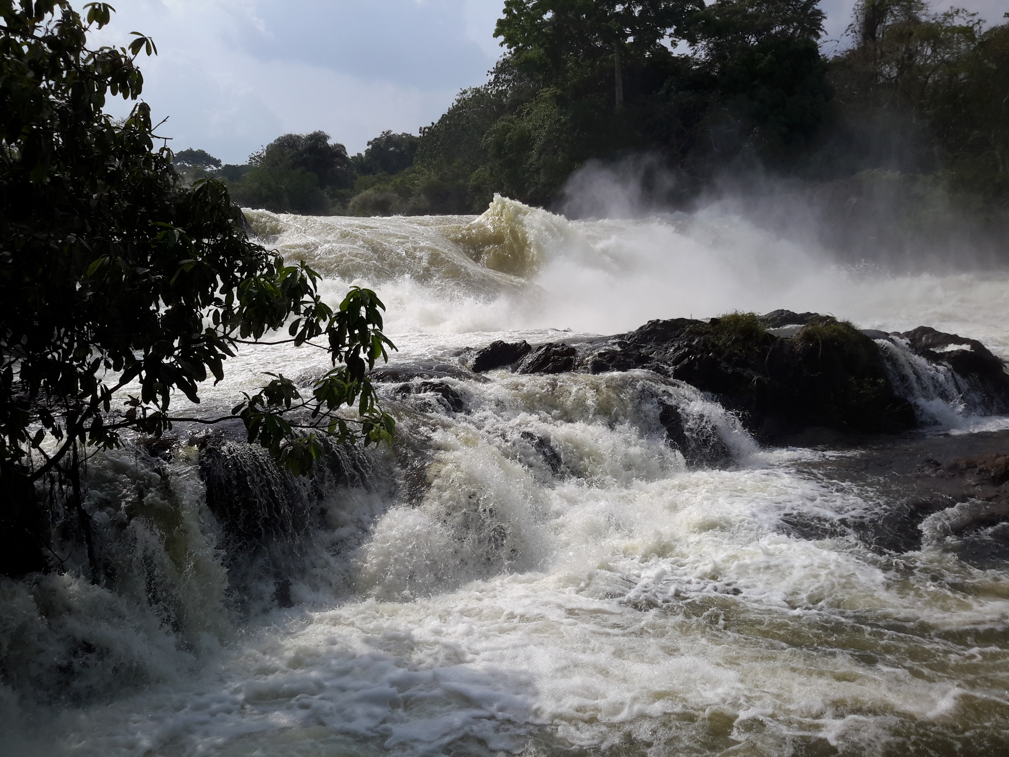 Site touristique de la région de la Nawa dans la ville de Soubré